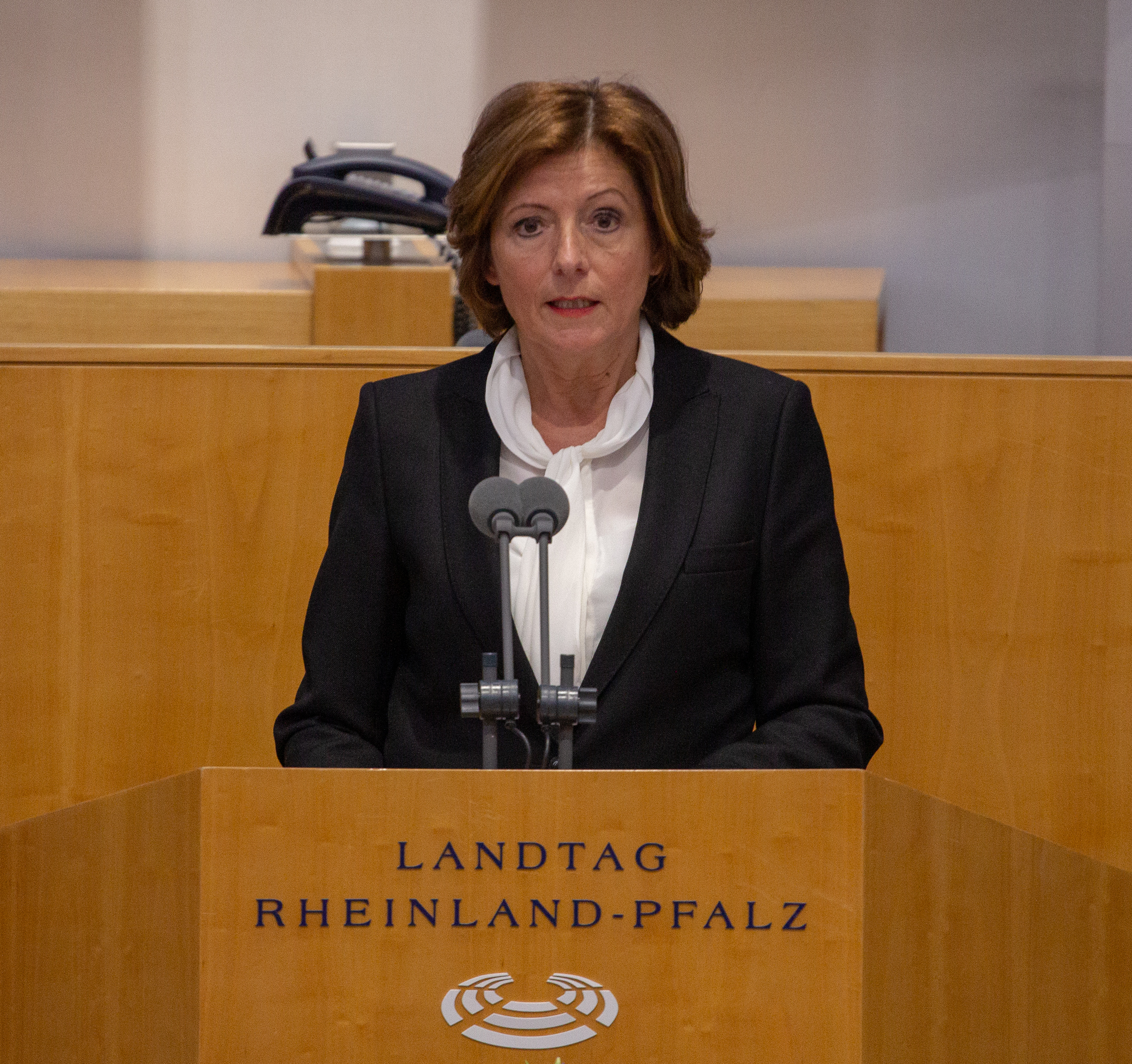 Malu Dreyer beim Tag des Gedenkens an die Opfer des Nationalsozialismus im Landtag Rheinland-Pfalz am 27. Januar 2019.